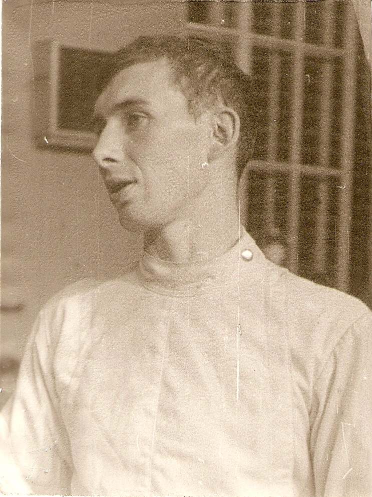 Alexei Nikantchikov